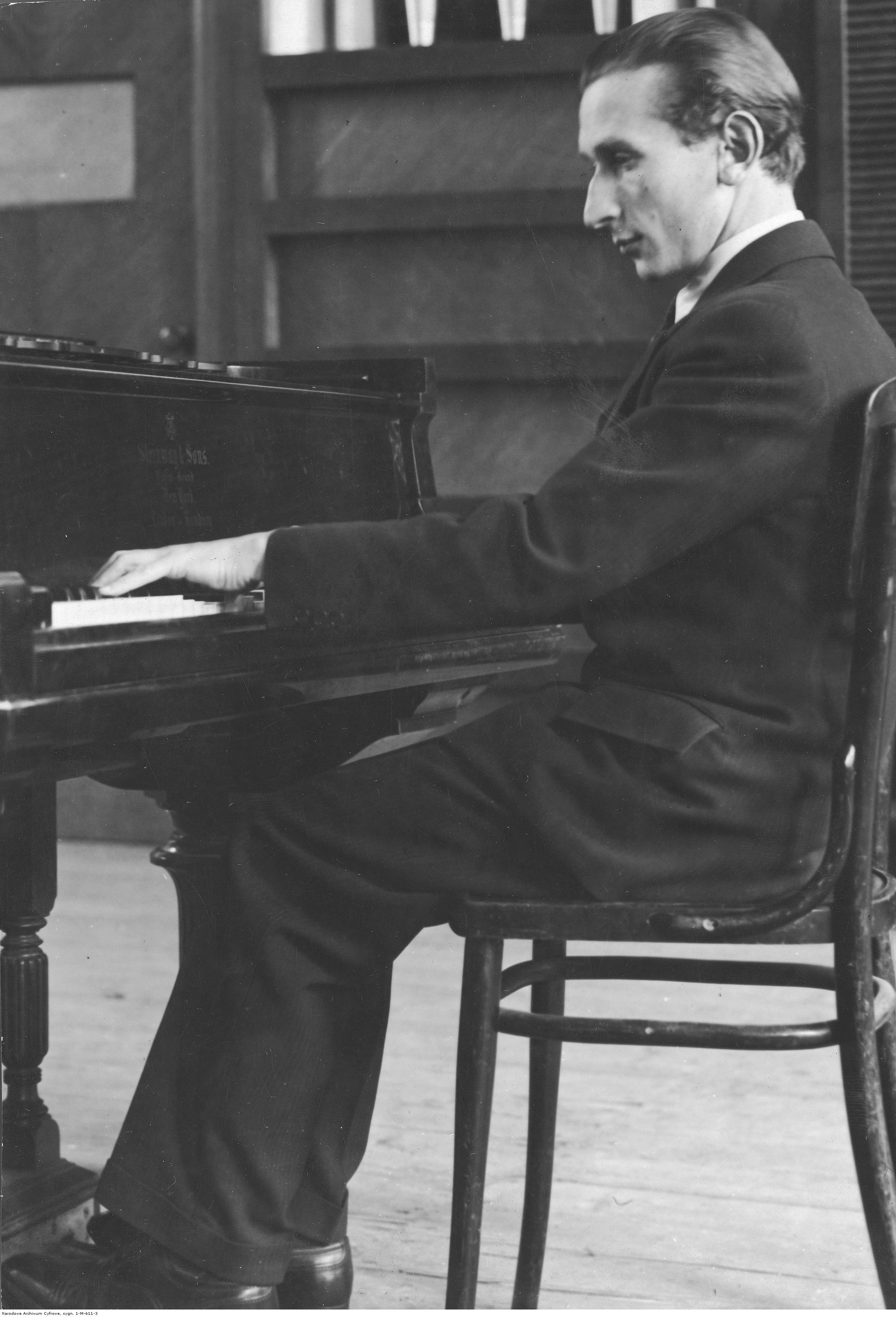 2nd Chopin Competition laureate: Alexandre Uninsky